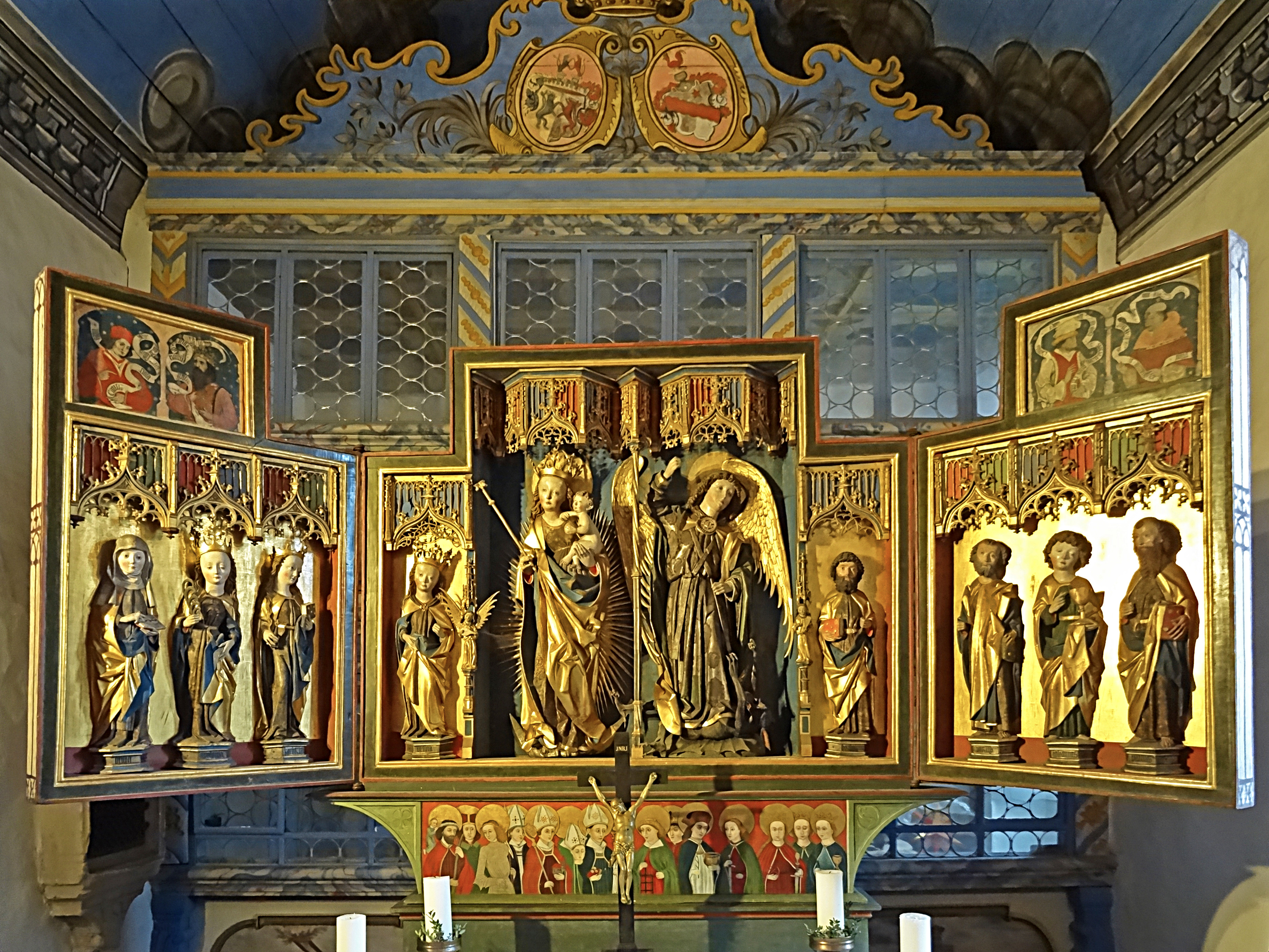 Spätgotischer Schnitzaltar in der Dorfkirche St. Michael (Großkochberg) aus Saalfelder Schule um 1500. Im Mittelschrein Maria mit dem Kinde und der Hl. Michael zwischen den Hl. Ursula und Bartholomäus. Auf den Flügeln innen links: Lucia, Appollonia, Katharina, innen rechts: Petrus, Johannes der Evangelist und Paulus. Auf den Flügel-Erhöhungen links: David und Isaak, rechts